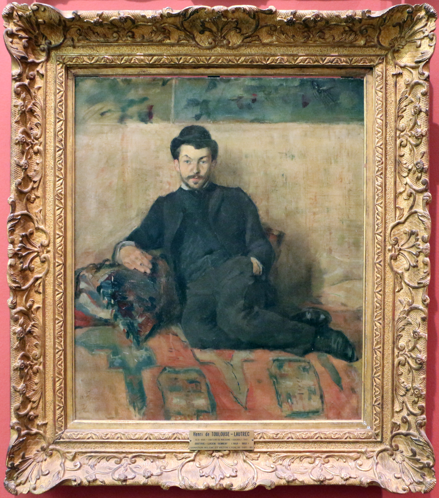 Henri de toulouse-lautrec, Gustave Lucien Dennery, huile sur toile, Paris, musée d'Orsay (dépôt du musée du Louvre).